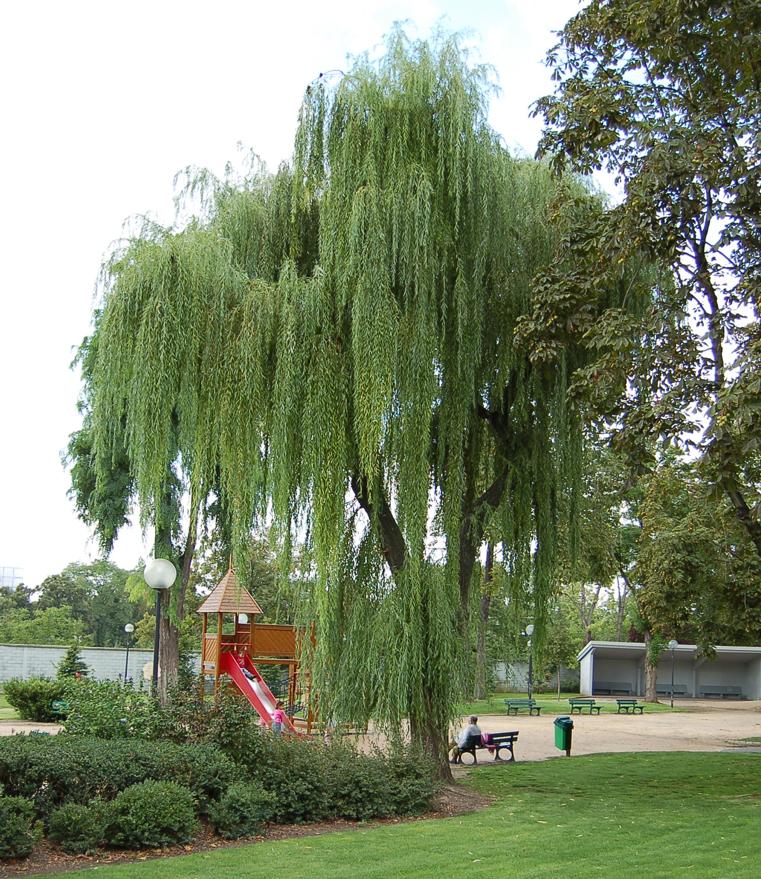 Saule Pleureur - Weeping Willow